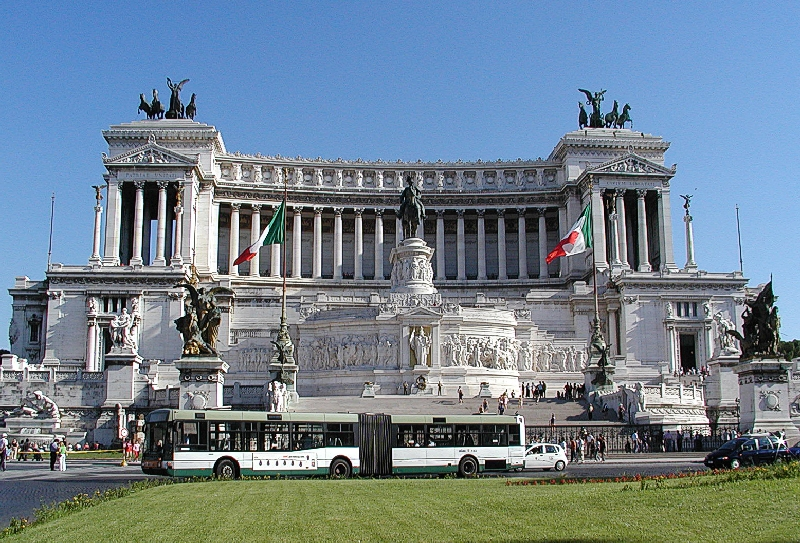 Bilder aus Rom